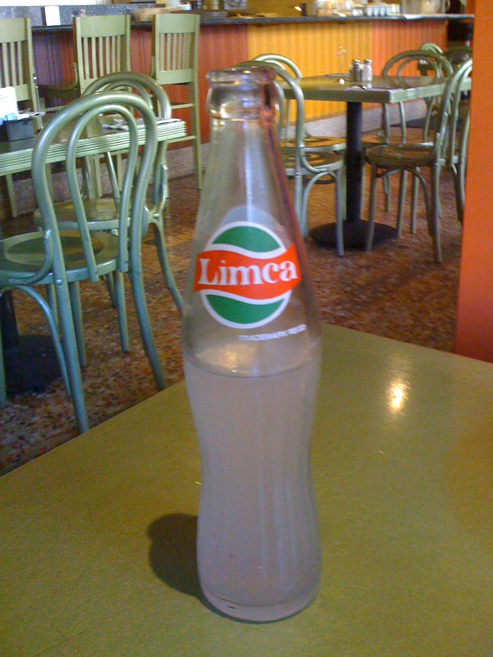 Limca soft drink